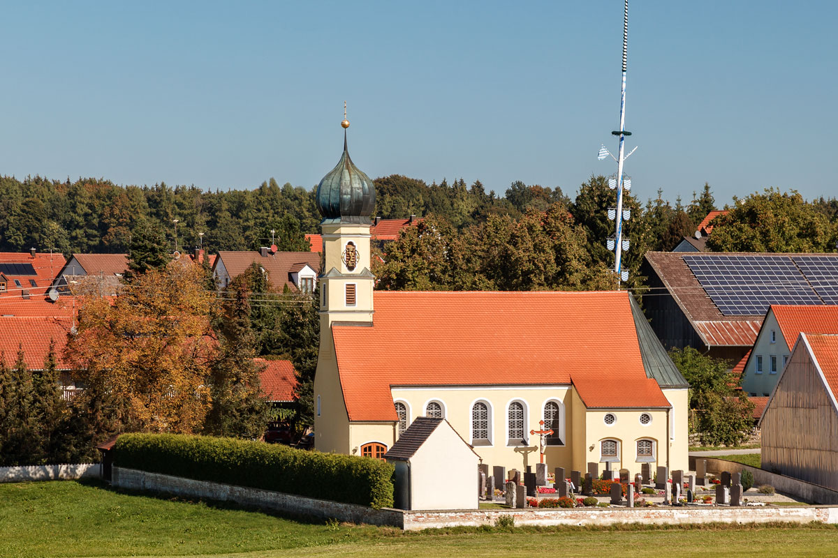 Ansicht von Süden